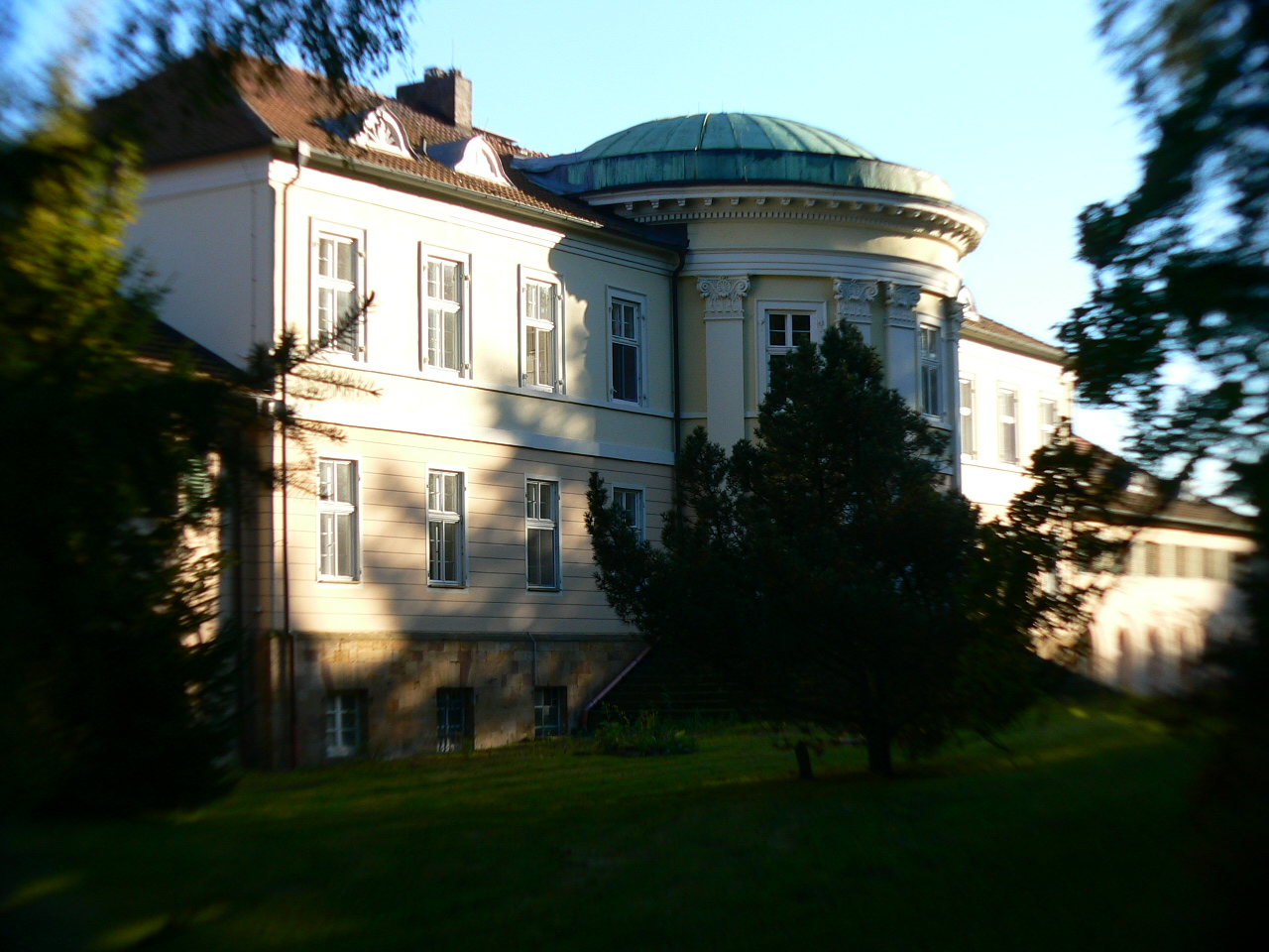 Schloss Beberbeck, Rückfront mit Rotunde, in Hofgeismar-Beberbeck im Landkreis Kassel, Hessen, Deutschland